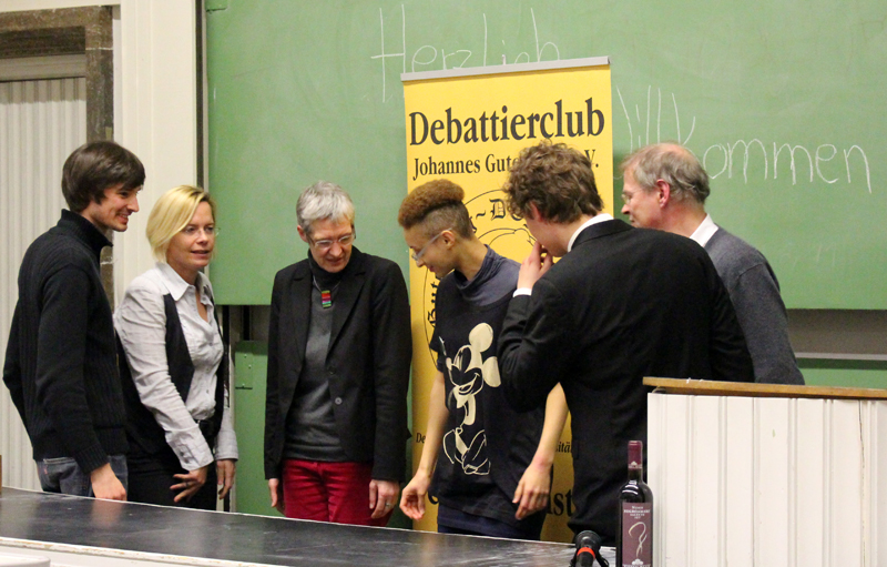 Debattiergclub Johannes Gutenberg e.V. zum Thema: "Soll Wikipedia Weltkulturerbe werden?!". Von links nach rechts: Daniil, Juraprofessorin Dagmar Kaiser, Psychologieprofessorin Margarete Imhof, Ich-kann-Kanzler-Gewinnerin Allison, Marc und Chemiker Wolfgang Tremel.